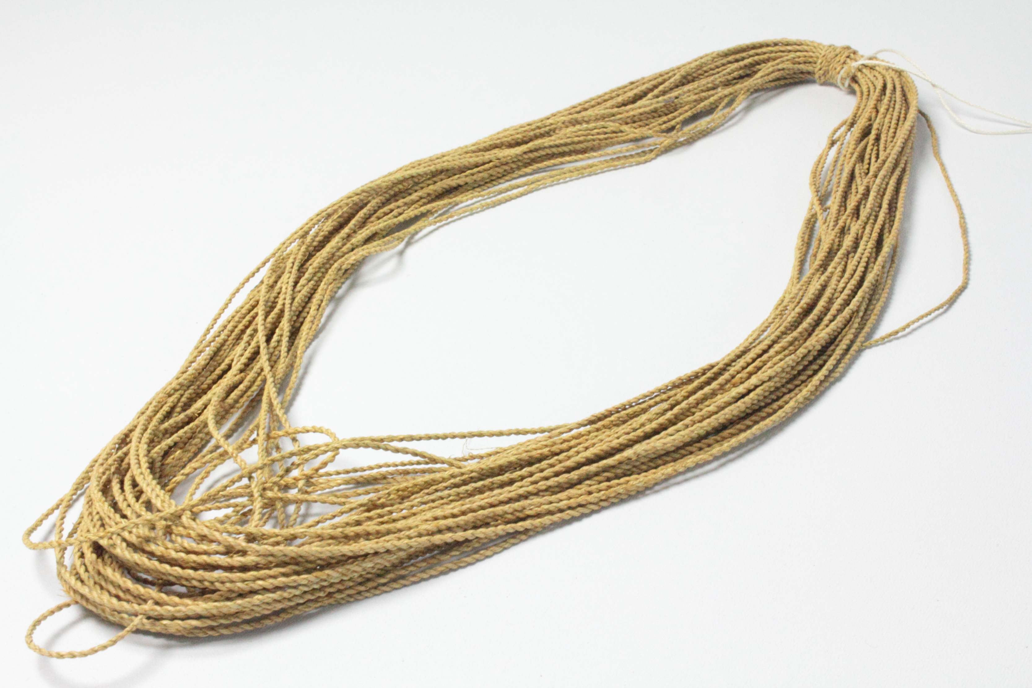 Reifegürtel